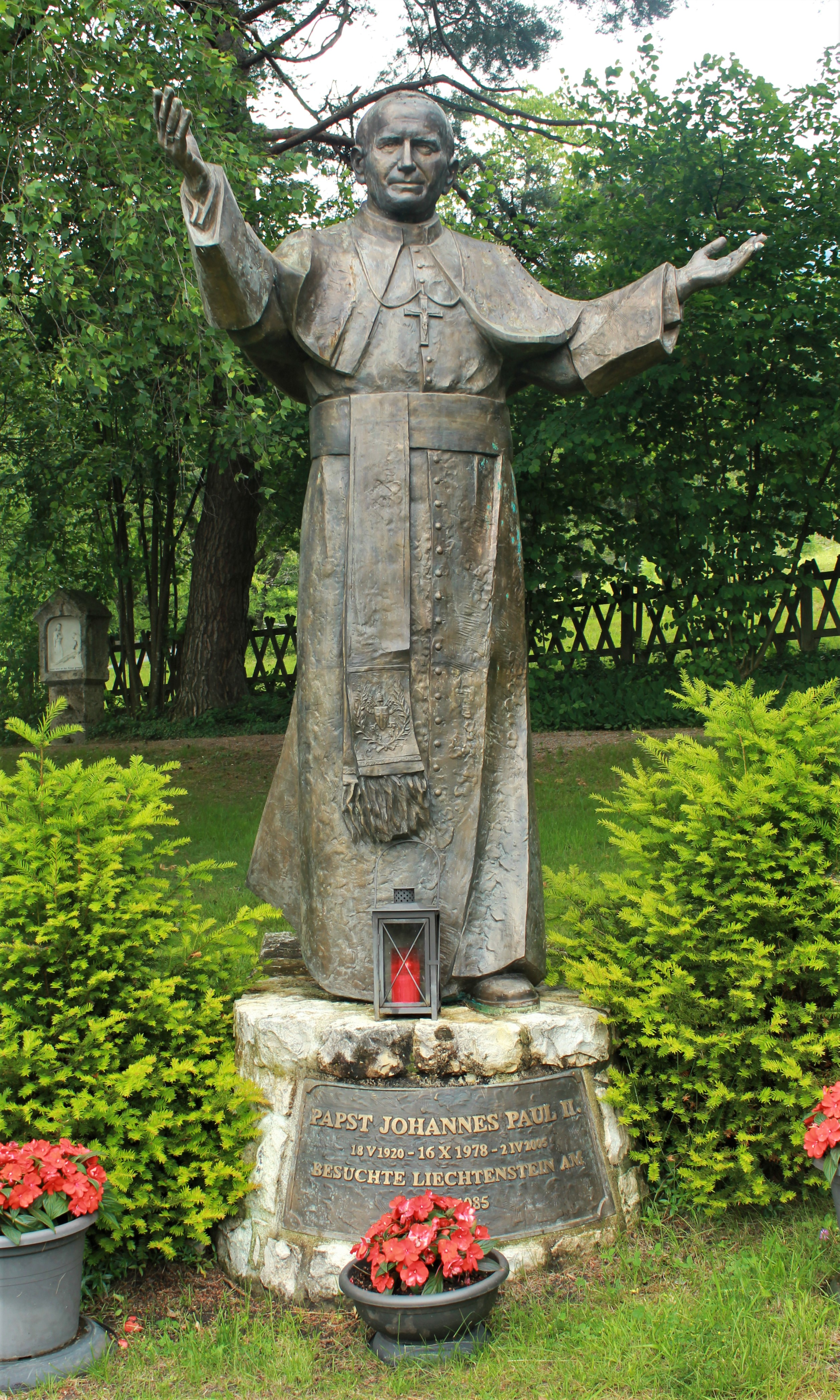 Eine Statue im Garten der Duxkapelle erinnert an den Besuch von Papst Johannes Paul II. im Jahr 1985.